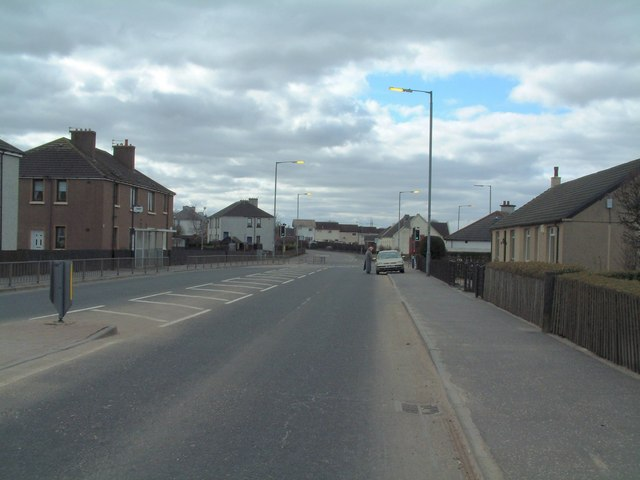 Allanton main street